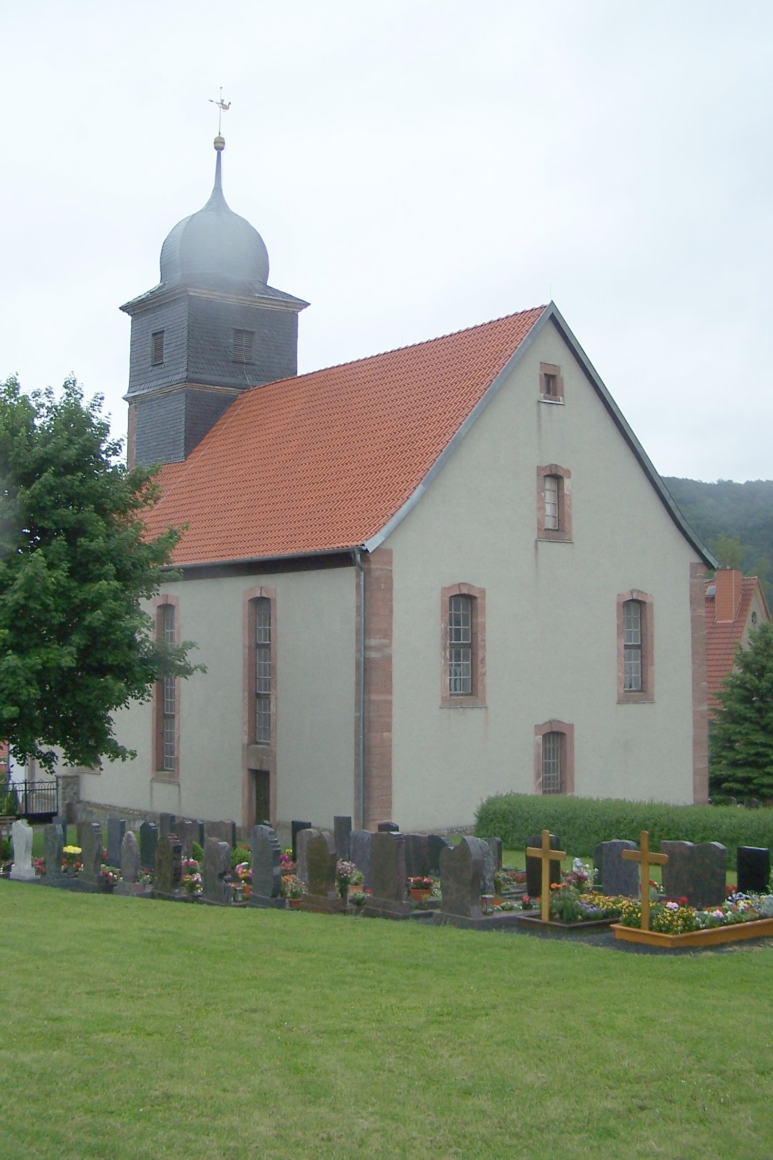 Ansichten aus dem Ort Diedorf im Feldatal.